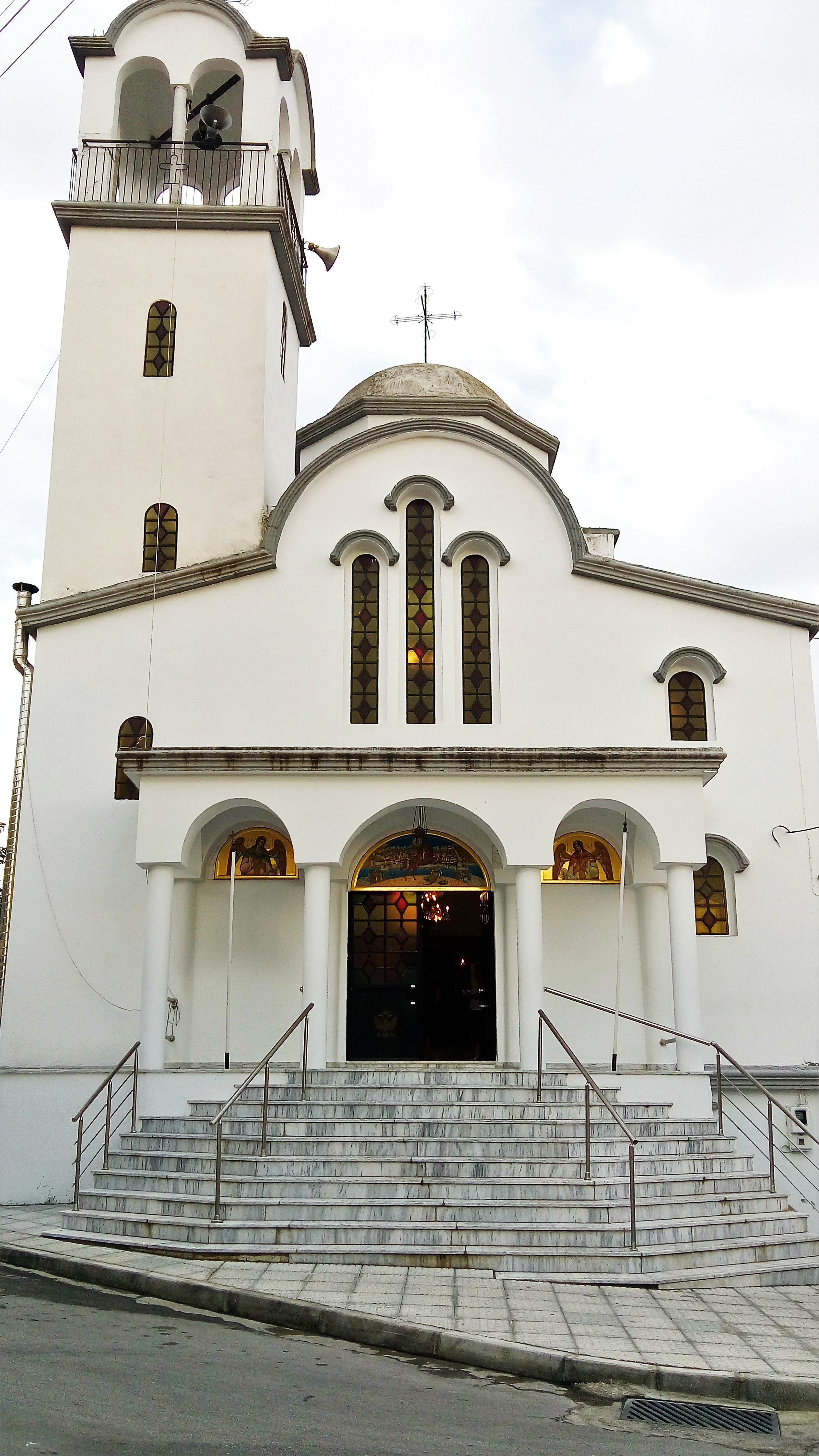 Ο ναός του Αγίου Δημητρίου την κεντρική πλατεία του Νέου Σουλίου μετά την ανακατασκευή του λόγω πυρκαγιάς.